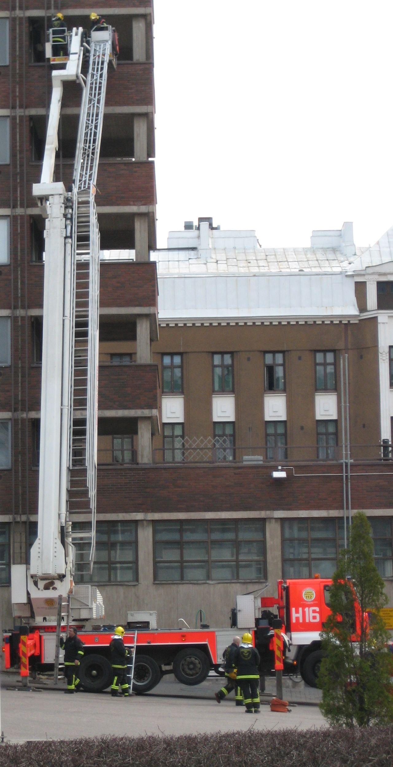 telescopic aerial platform unit Helsinki H16